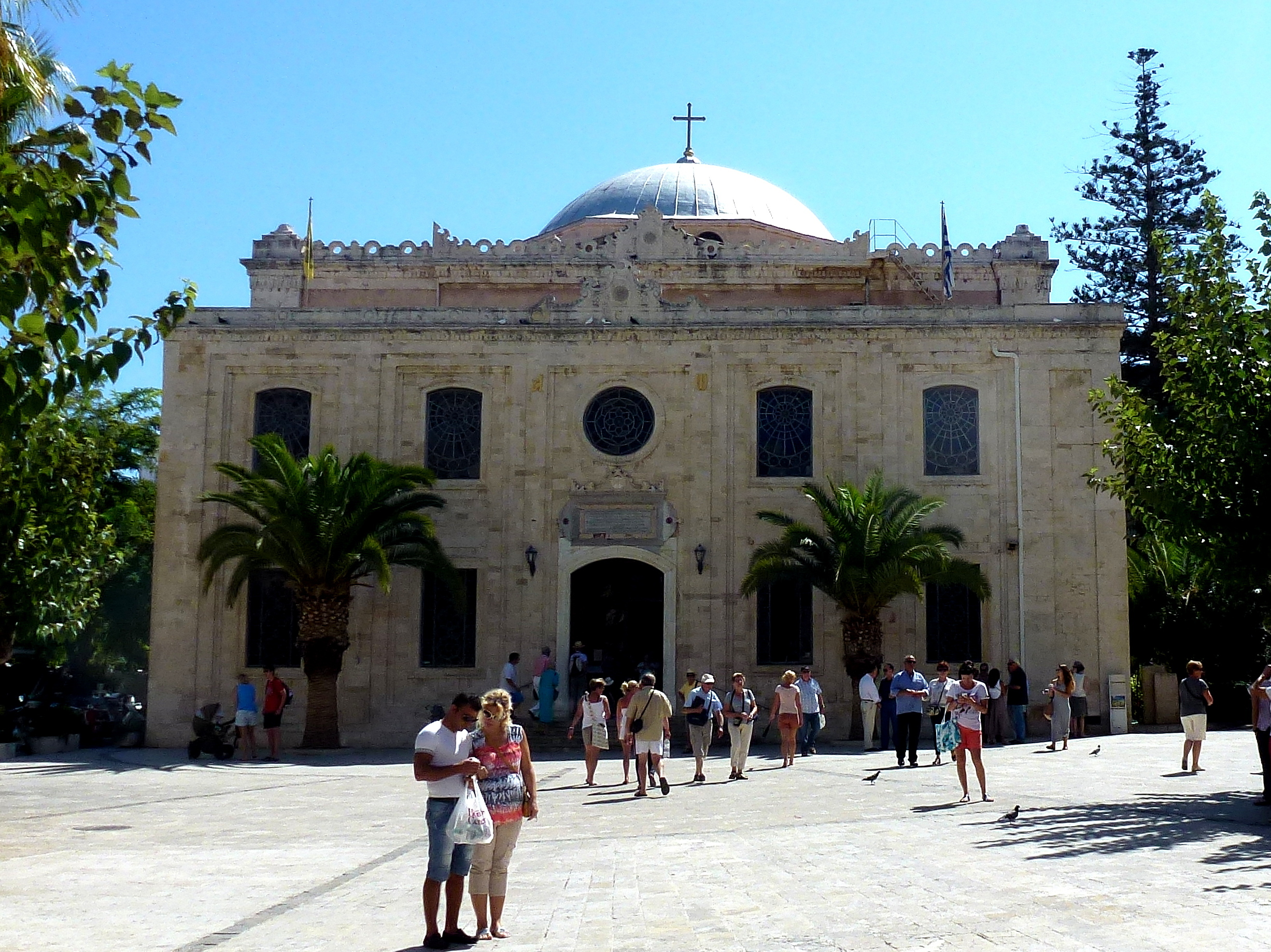 Frontansicht der Kirche Agios Titos